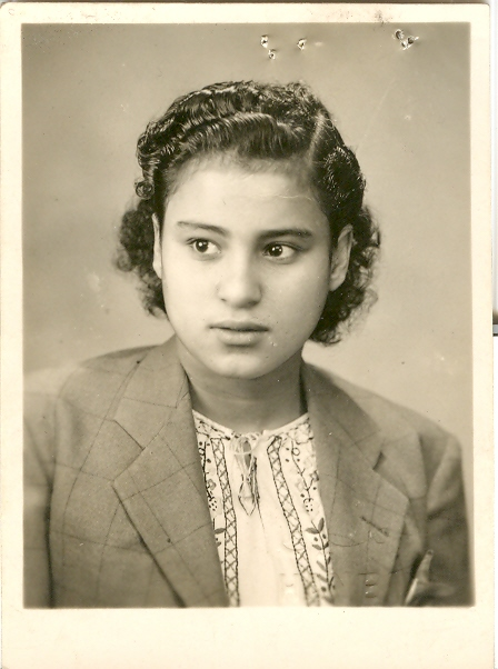 صورة للدكتورة فاطمة موسى أستاذة الأدب الإنجليزي الراحلة بجامعة القاهرة في مرحلة الشباب، ممسوحة ضوئيا من الأصل الورقي مصدر الصورة هو مجموعة صور منى أحمد سيف الإسلام (حفيدة صاحبة الصورة) على موقع فليكر بعد إذن شخصي من صاحبة الصورة.